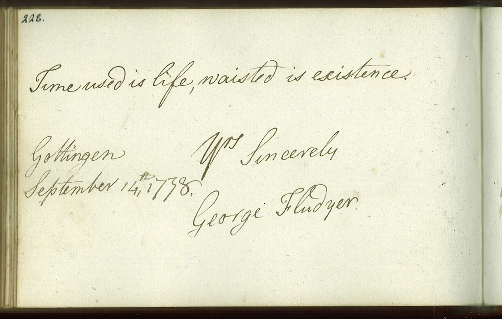 Eintrag des George Fludyer im Stammbuch Johan David af Sandeberg in Göttingen 1778. Vgl. Hans Sallander: Stamböcker i Skara stifts- och landsbibliotek, Stifts- och landsbiblioteket i Skara, Skara 1980, S. 45